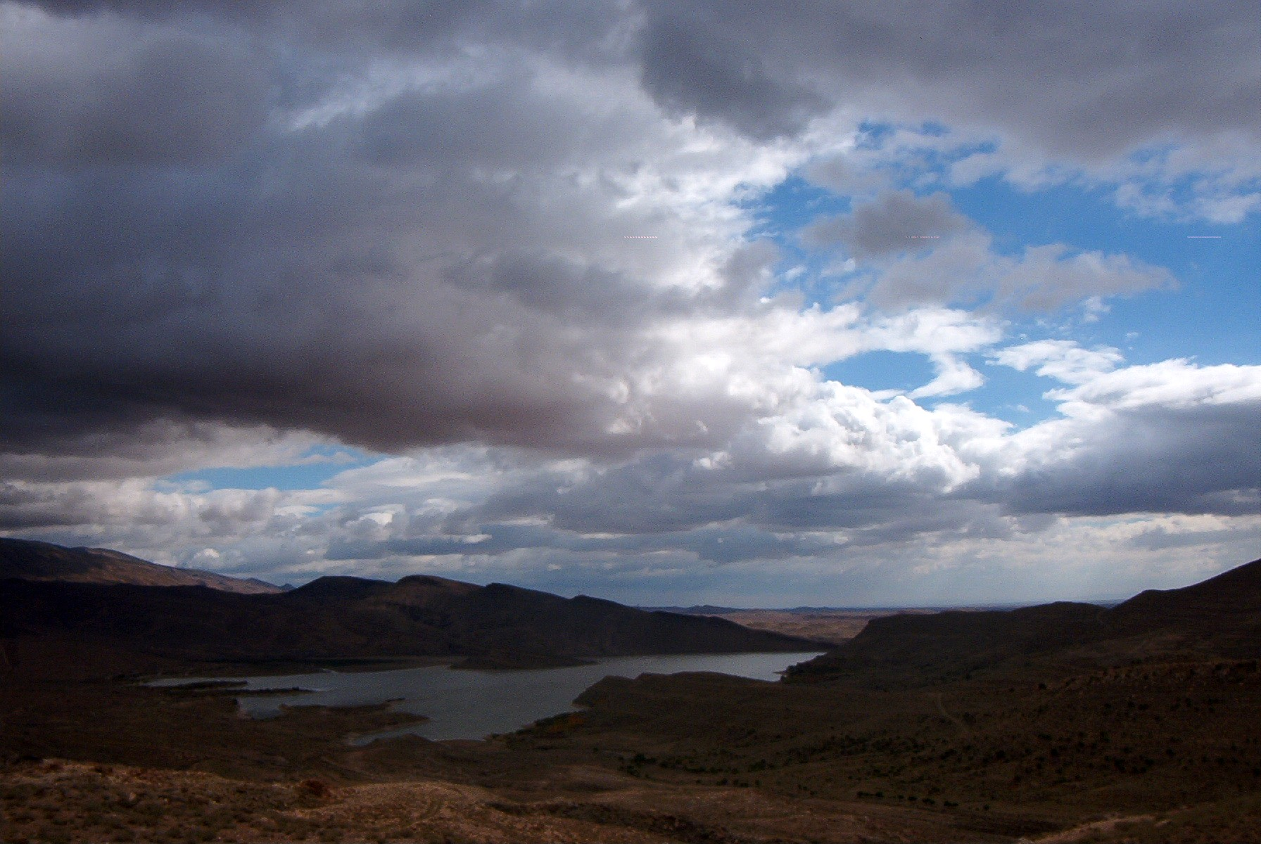 Barrage du Ksob dans la Wilaya de M'Sila